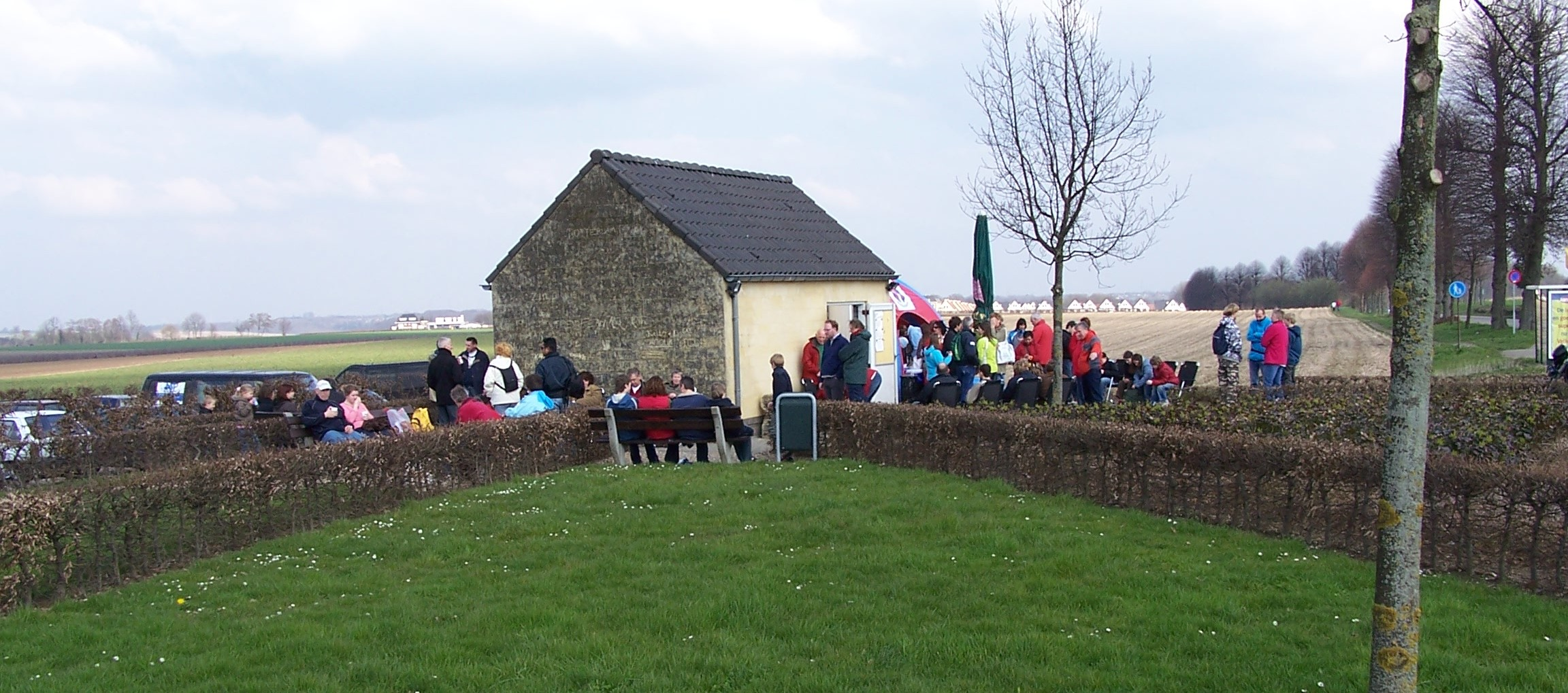 Secundaire ingang naar de Sibbergroeve nabij het kruispunt Dorpsstraat-Daalhemerweg, Sibbe. Zuid-Limburg. Deze ingang wordt gebruikt voor o.a. mountainbiketours in een deel van de ondergrondse krijtgroeve.